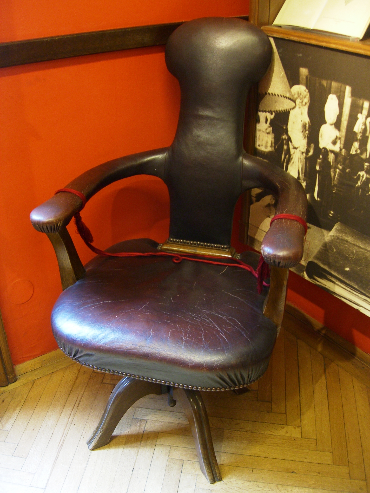 Sillón del escritorio de Freud. Museo Sigmund Freud, Viena. Este sillón es una reproducción del original que Freud recibió como regalo de su hija Mathilde